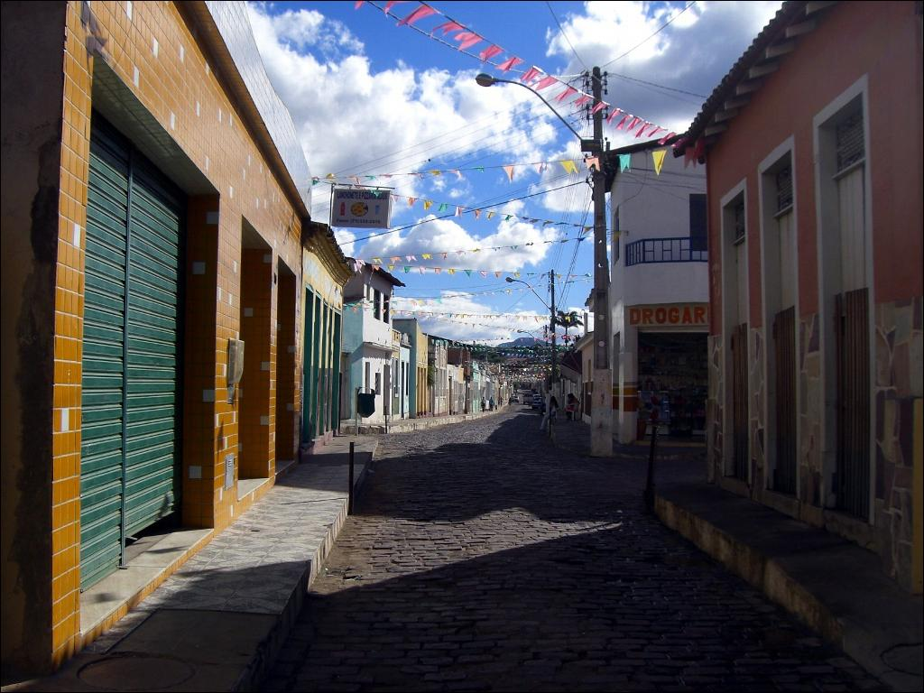 São João numa rua de Palmeiras, Chapada Diamantina, Bahia, Brasil.